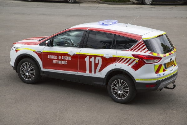 Den KDOW 2